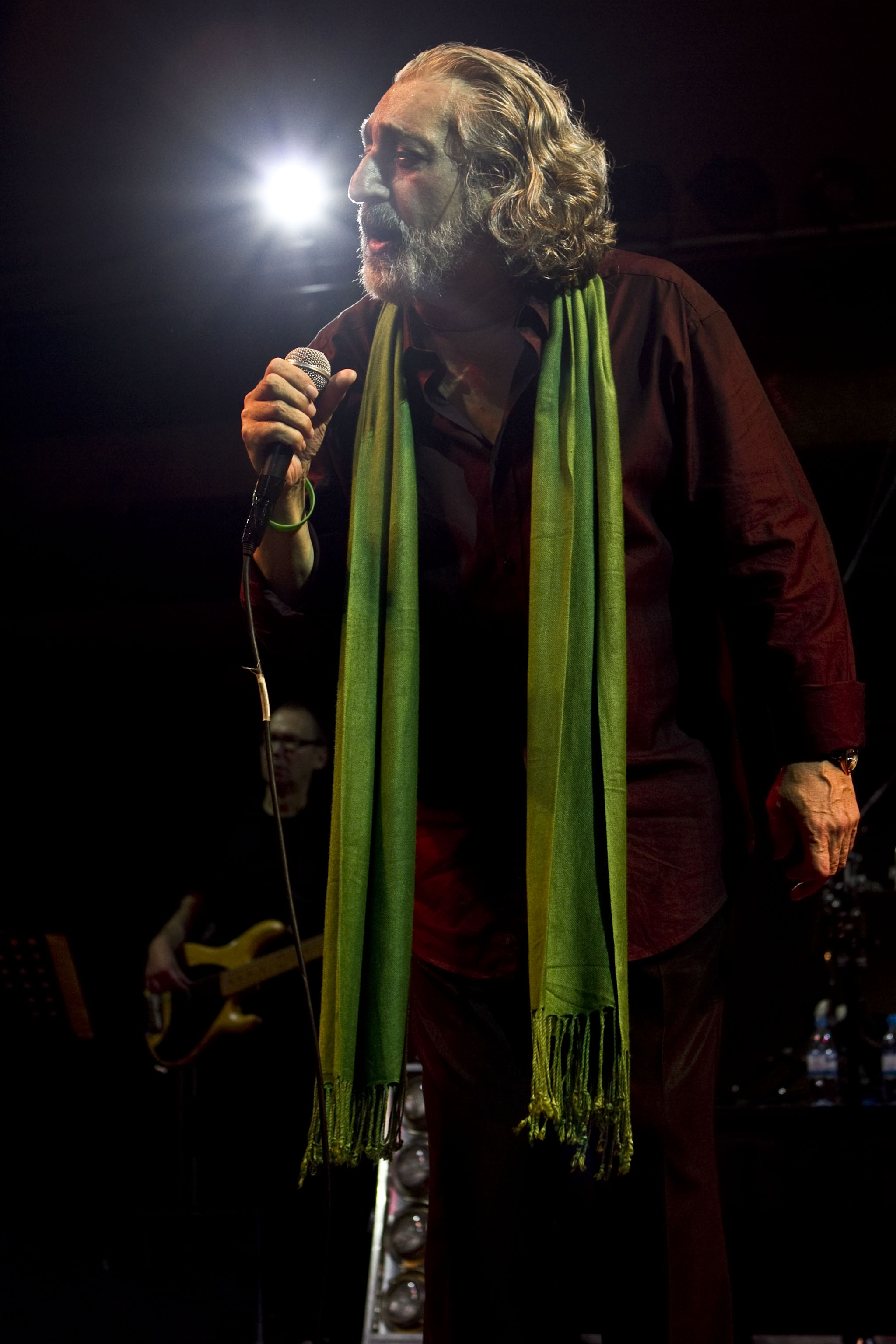 Ebi 2010 Kuala Lumpur Malaysia concert photos